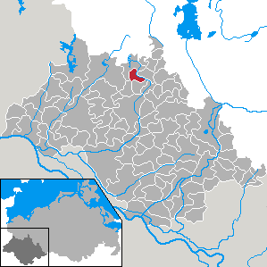 Schossin in Mecklenburg-Vorpommern - district Ludwigslust